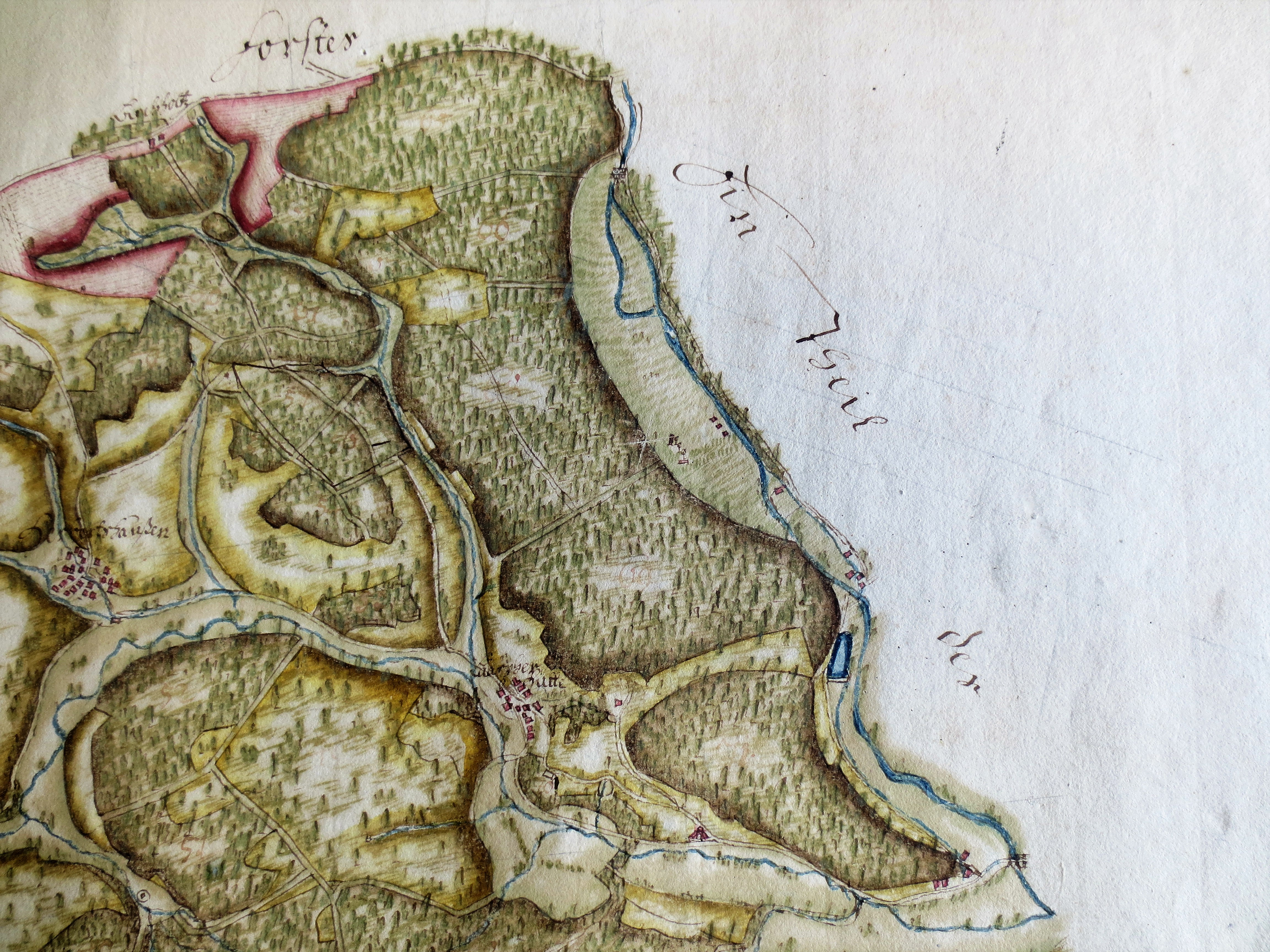 Kartenausschnitt des Laaspherhütter Forstes mit den Orten Kunst Wittgenstein, Laaspherhütte und Herbertshausen.